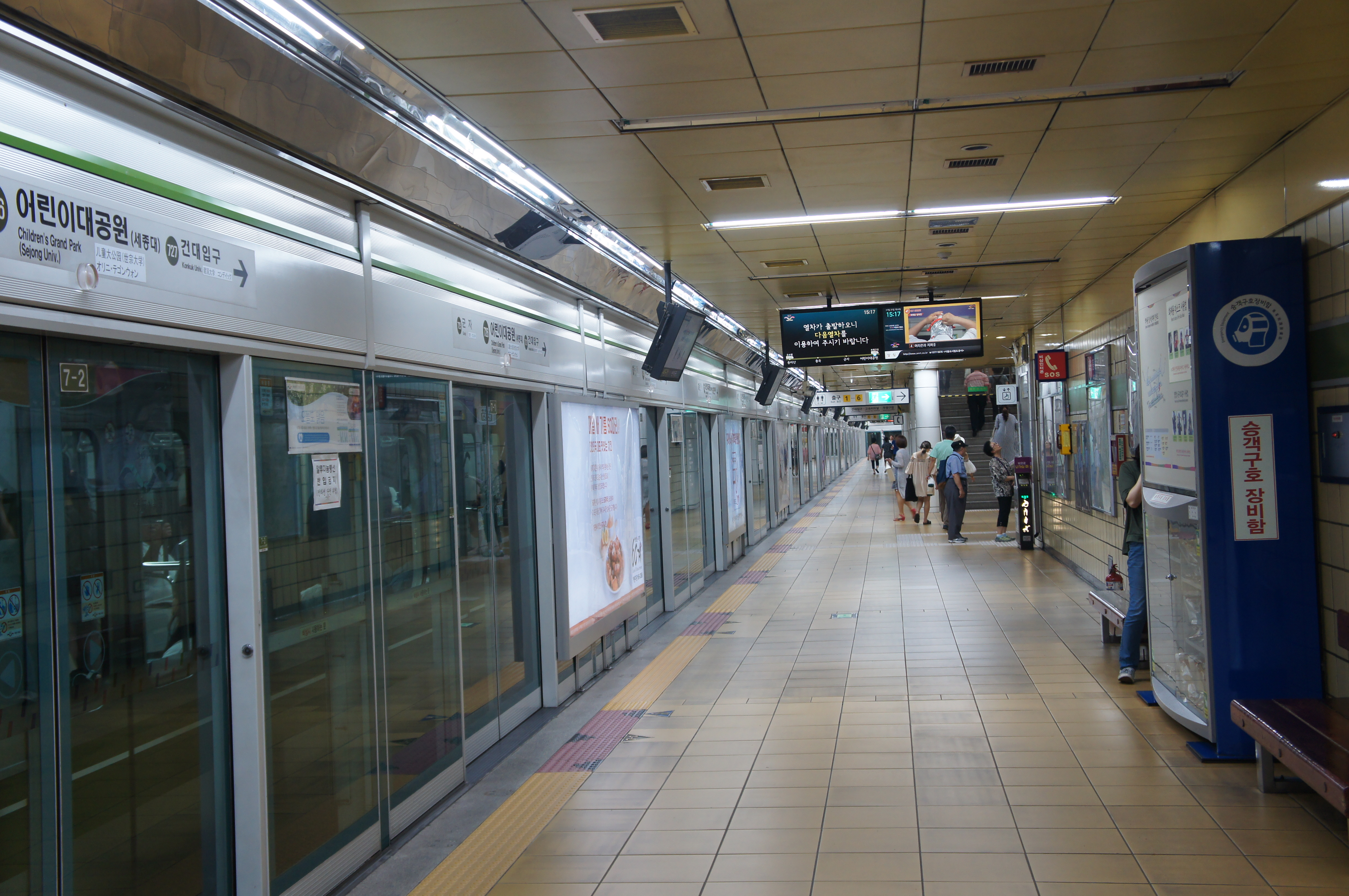 어린이대공원역 승강장